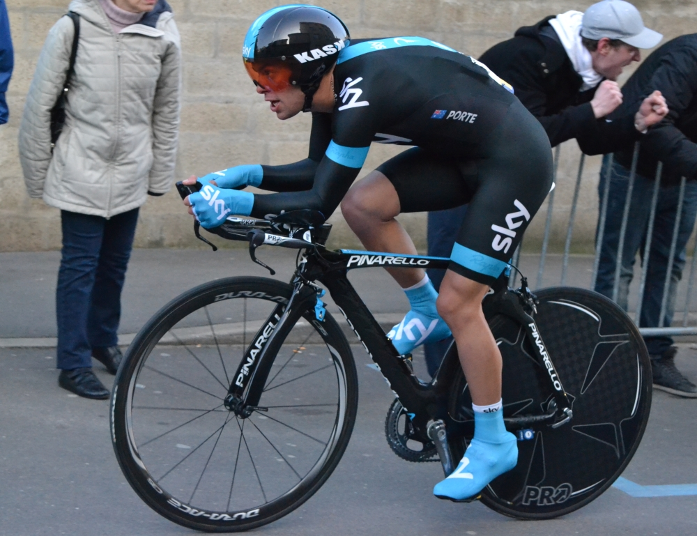 Richie Porte à Paris-Nice 2013